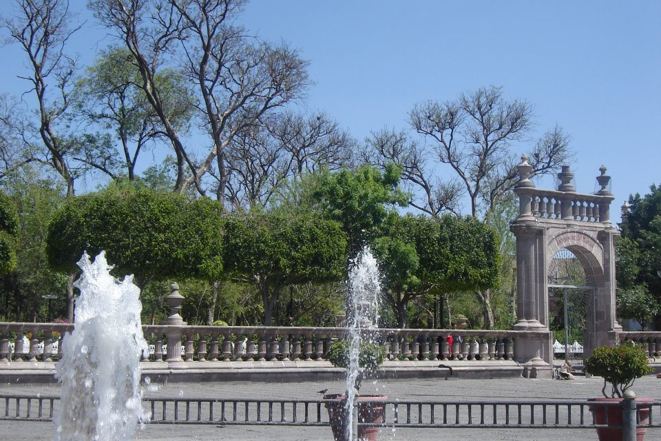 Fuentes de San Marcos